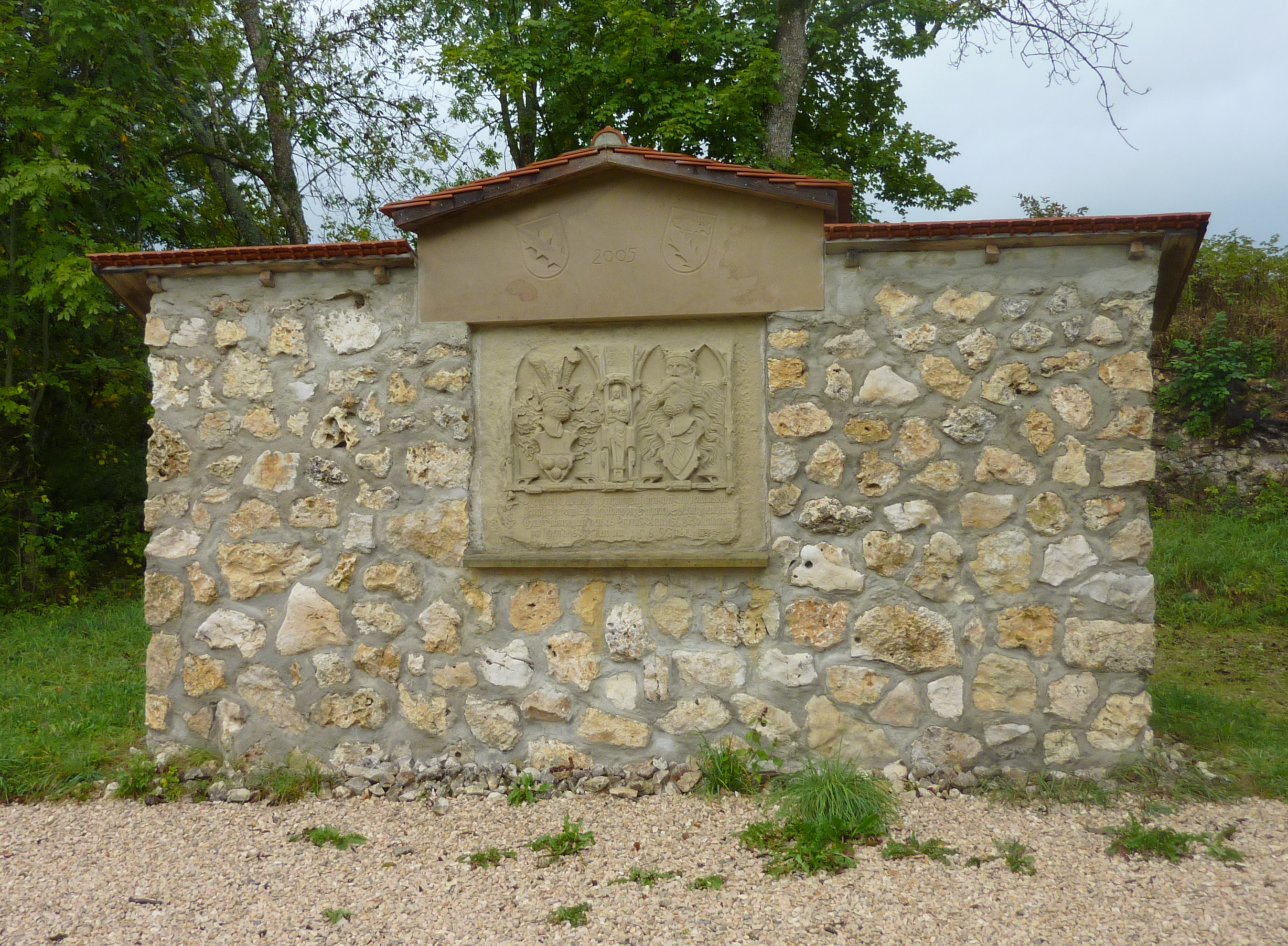 Justingen - Ruine des ehemaligen Schlosses